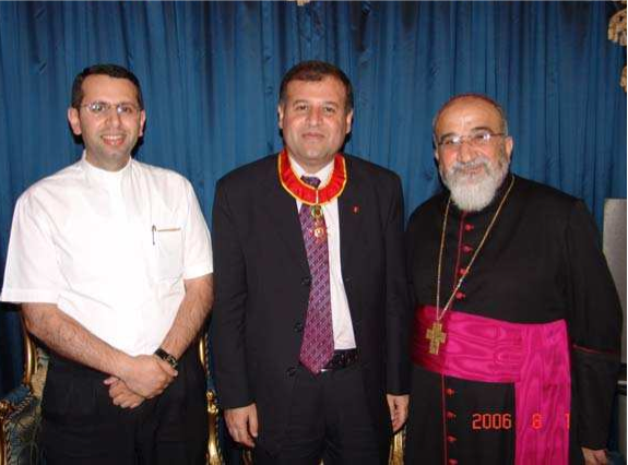 سرکیس اغاجان ( وسط ) و شهید اسقف فرج رحو (راست ) و شهید کشیش رغید در چپ تصویر هستند